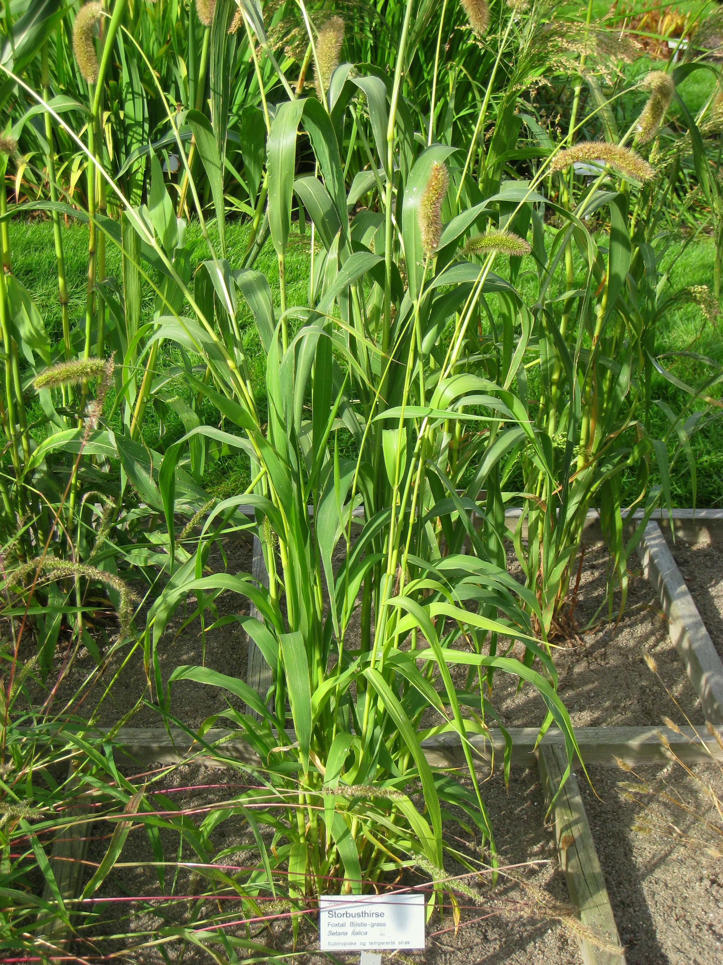 Setaria italica - Oslo botanical garden, Oslo, Norway.